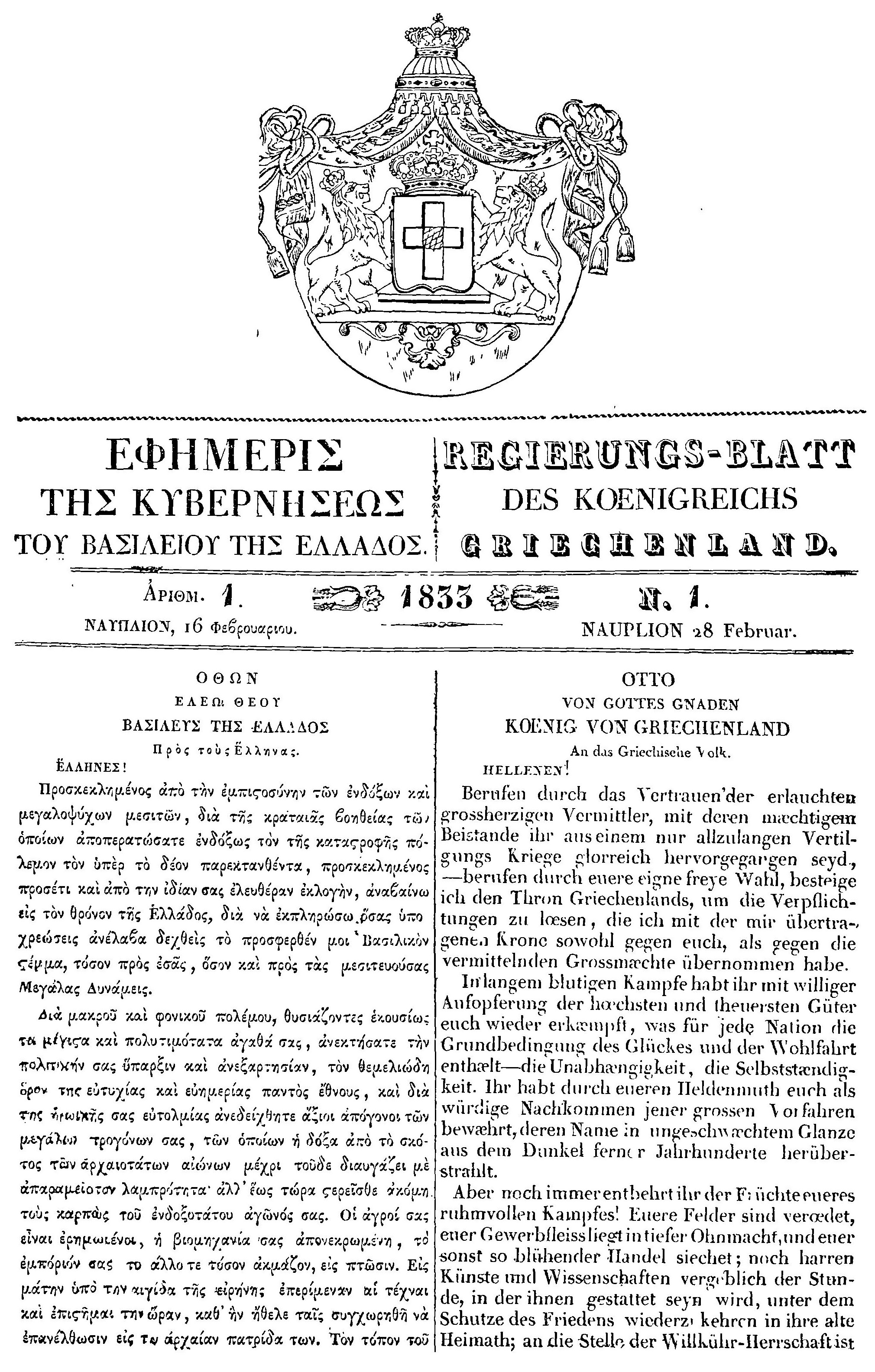 Amtliches Regierungsblatt